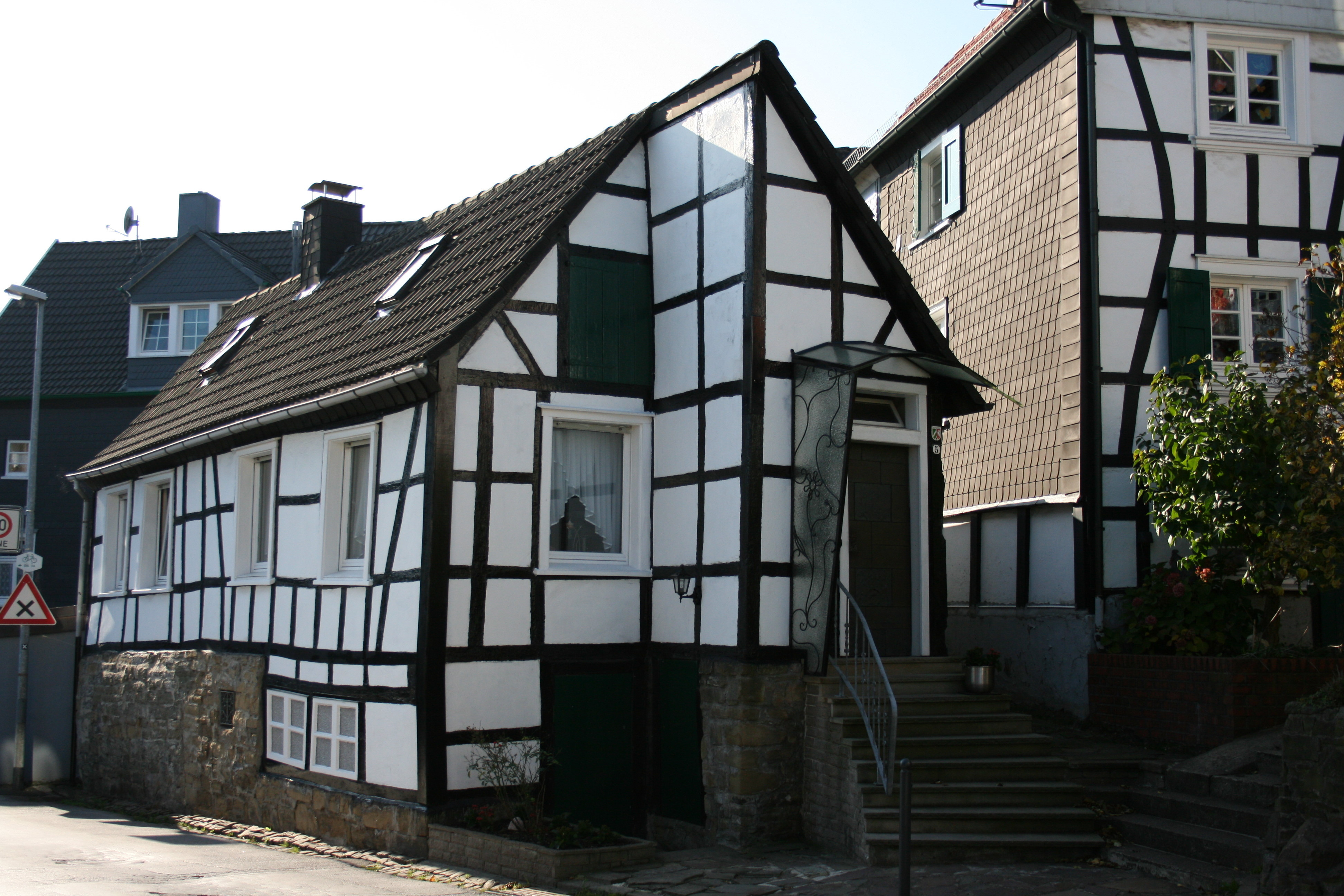 Hinnenberger Straße in Ennepetal-Voerde